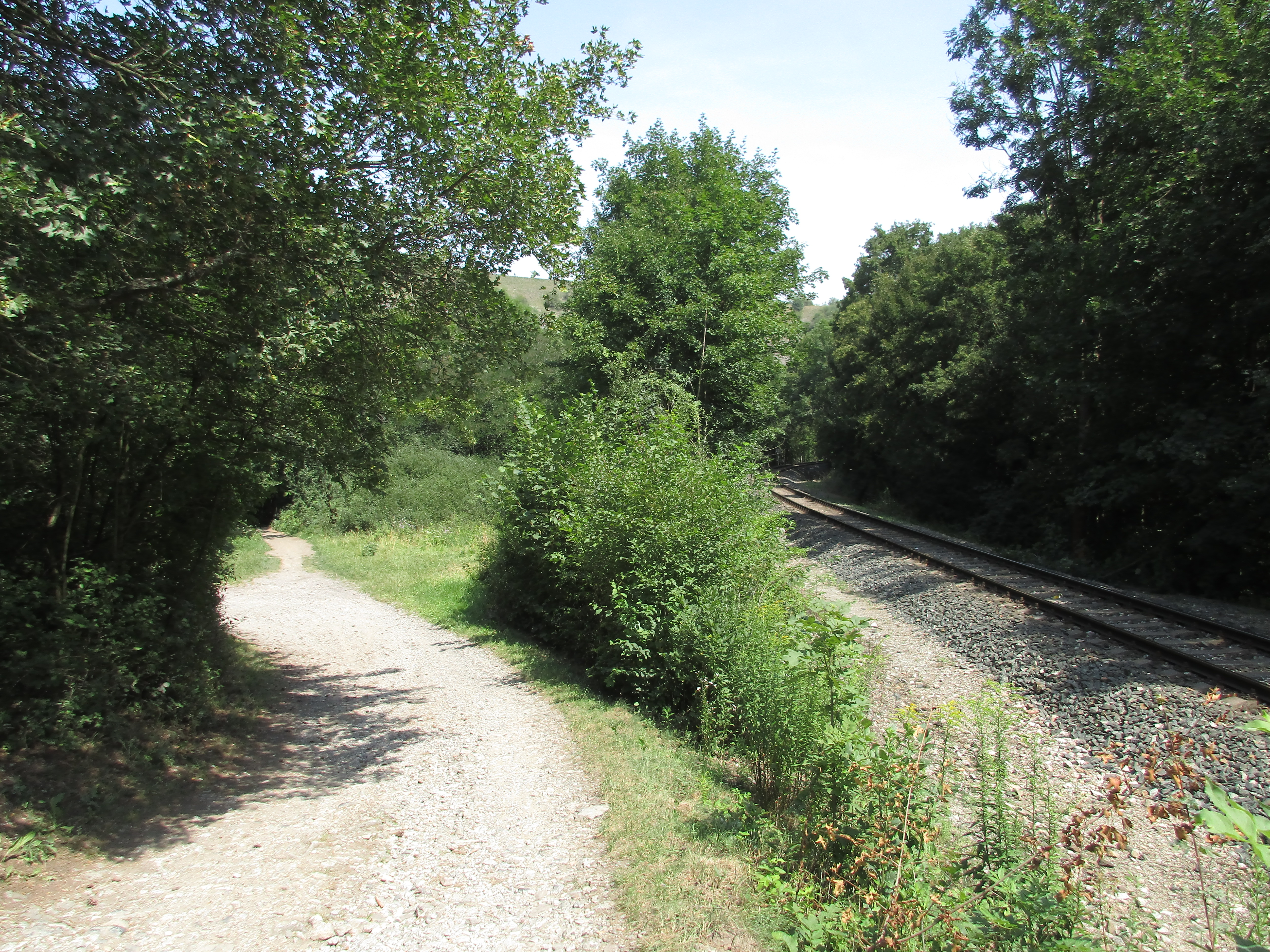 Trať 173 u Klukovic.